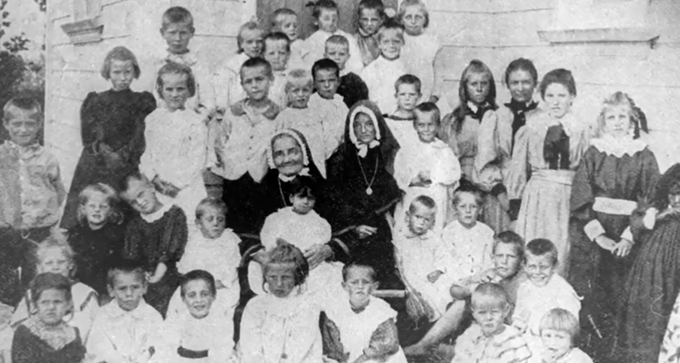 La vénérable Suzanne Aubert au milieu des enfants de son orphelinat.